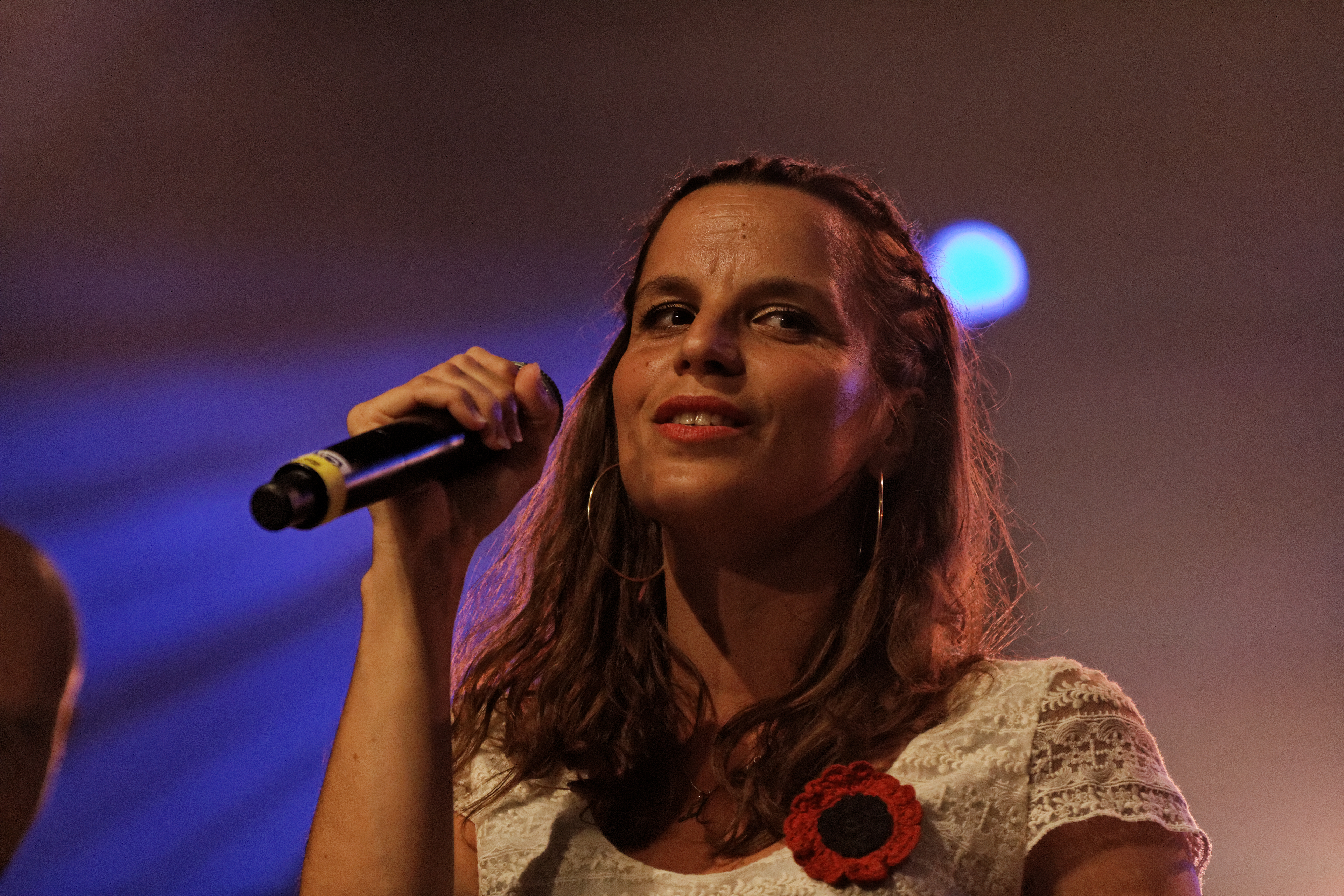 Dan ar Braz en concert sur la scène Gradlon lors du festival de Cornouaille 2013.